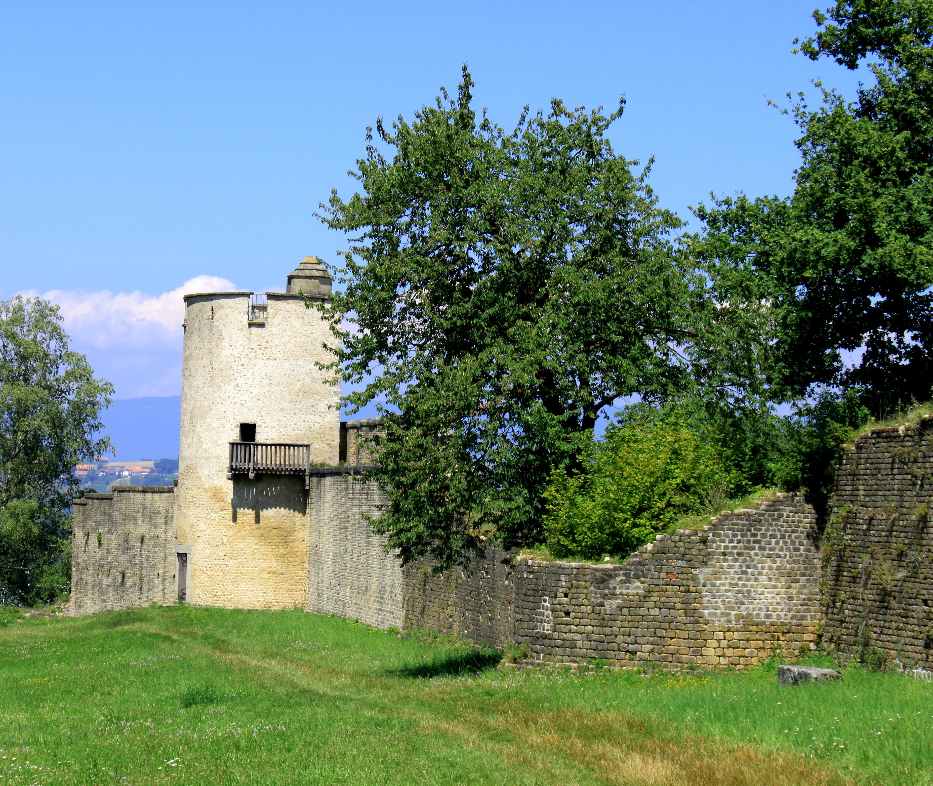 Suisse, canton de Vaud, Avenches, Aventicum (ville romaine). Vue de la porte de l’Est et Tornallaz (tour de garde).